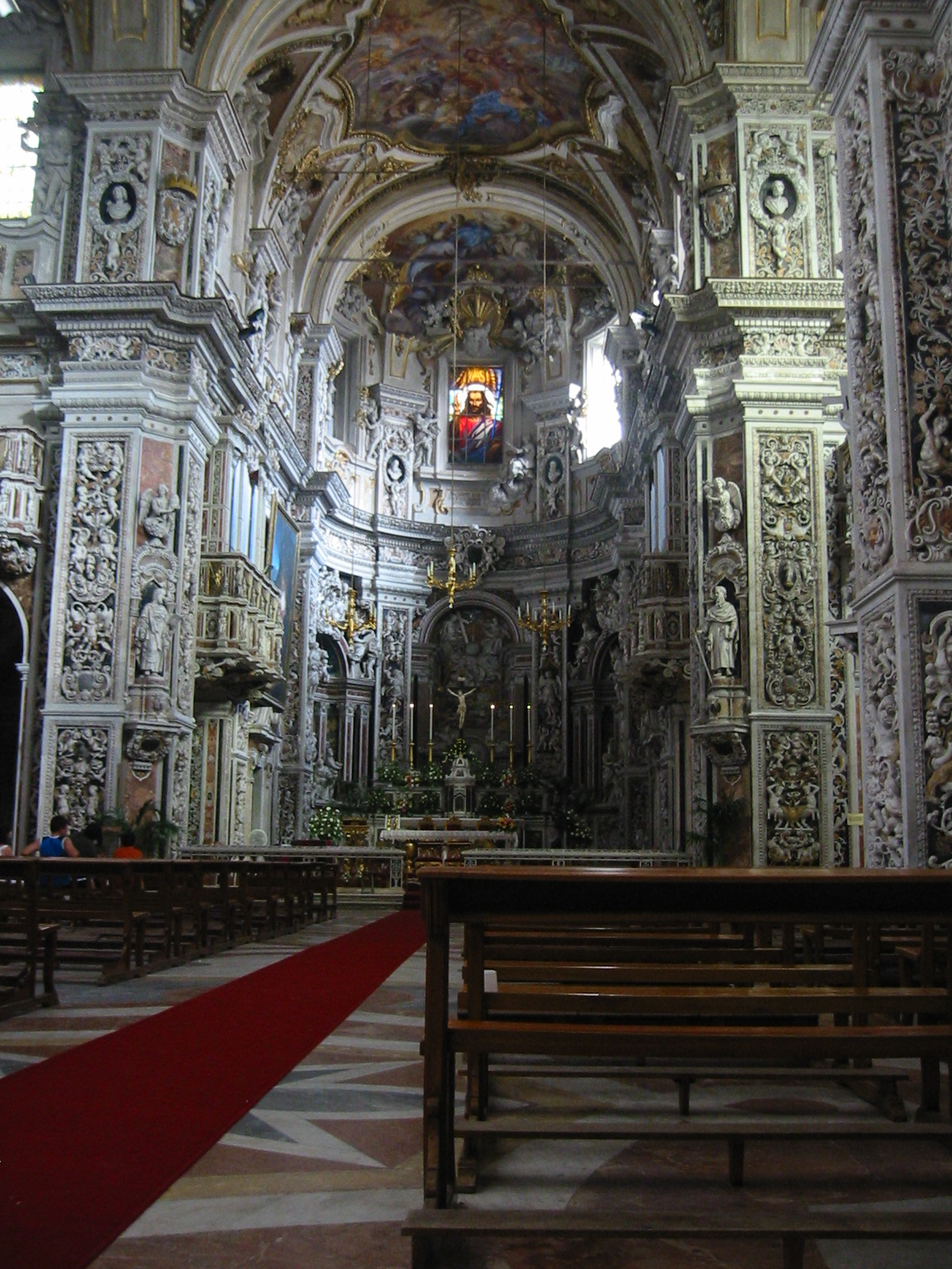 Ilustración 14: "La chiesa del Gesù", Palermo (1564-1633), con abudante uso de mármol policromado sobre piso y paredes.